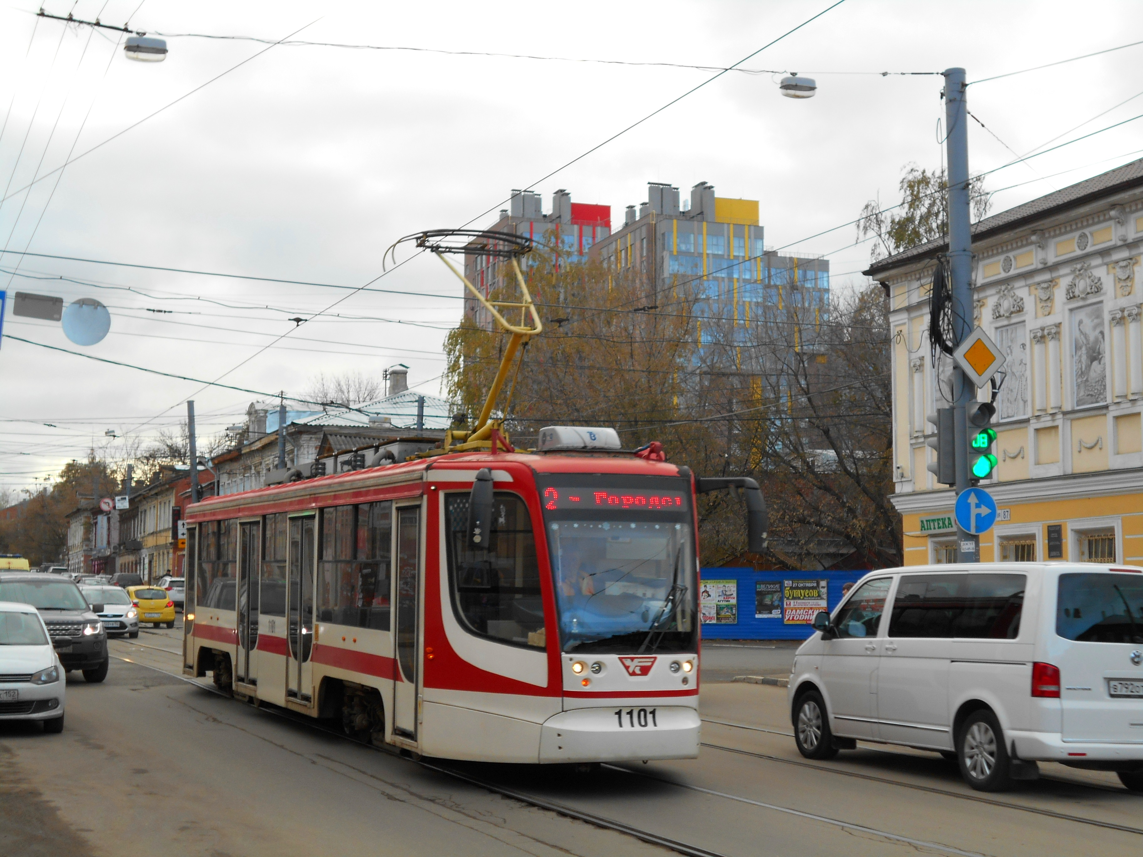 Трамвай 71-623 № 1101 на улице Ильинская (Нижний Новгород)